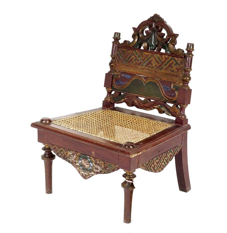 Stoel. Bruidsstoel